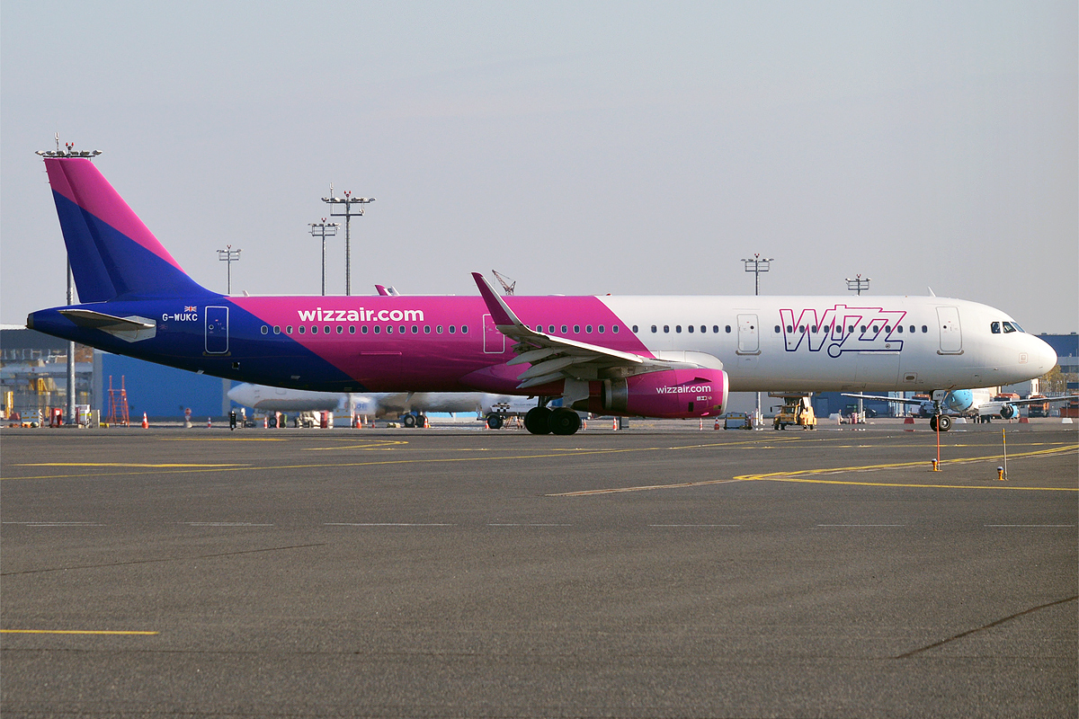 Wizz Air UK, G-WUKC, Airbus A321-231